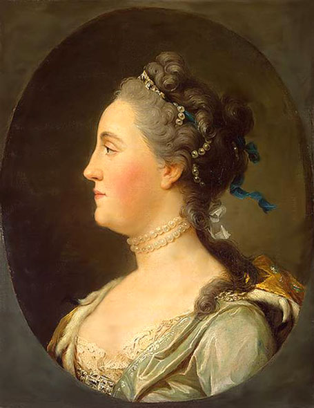 Эриксен, Вигилиус Портрет Екатерины II в профиль. До 1762. ГЭ Холст, масло. 262,5 x 201,5 Государственный Эрмитаж, Санкт-Петербург